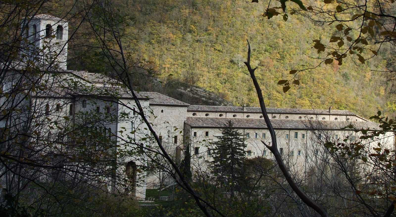 L'esterno della basilica e dell'eremo del Monastero di Fonte Avellana (PU)